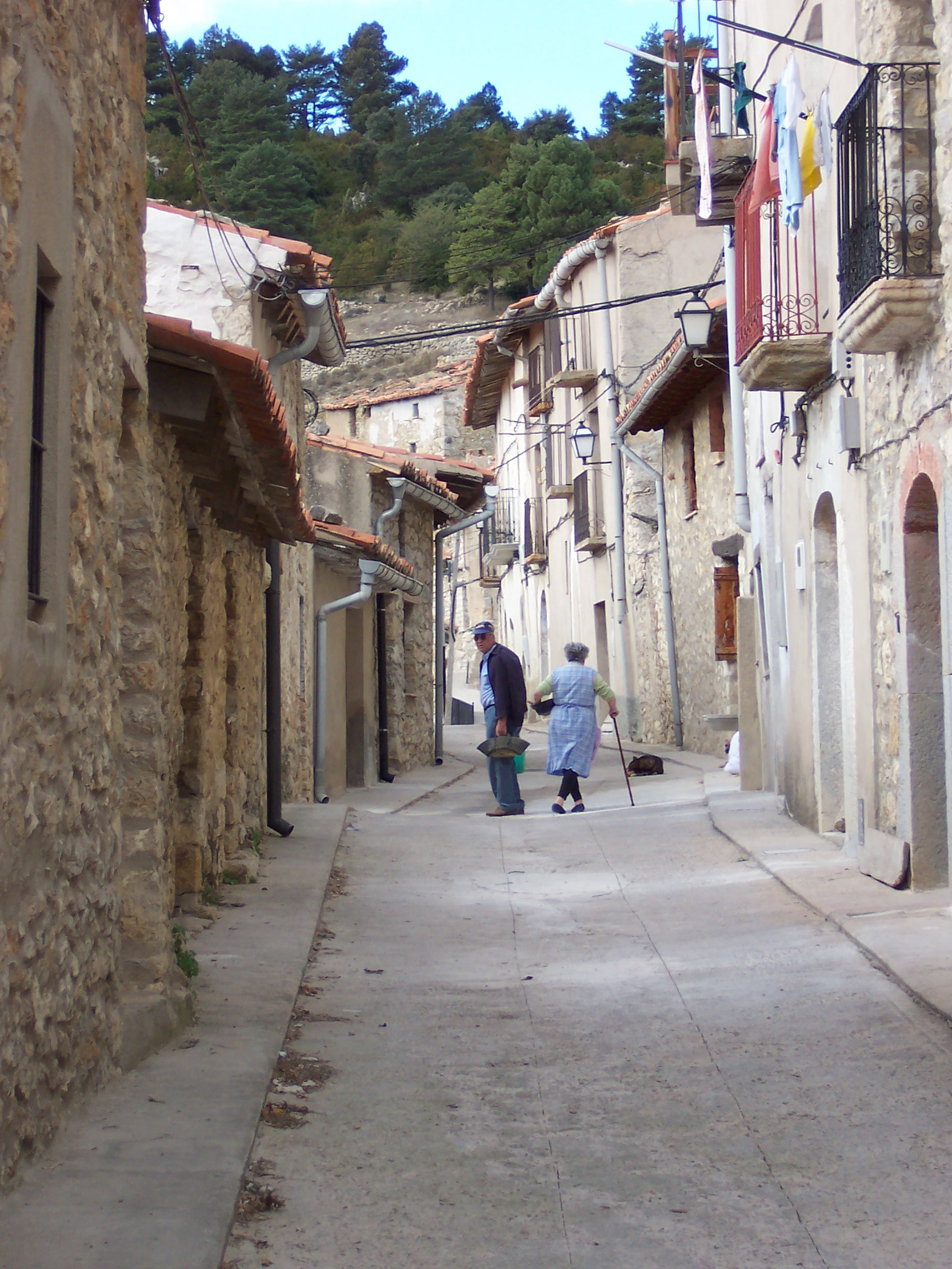 Foto de El Boixar, pedianía de la Puebla de Benifasar (17/10/2004). Autor: José F. Català Senent